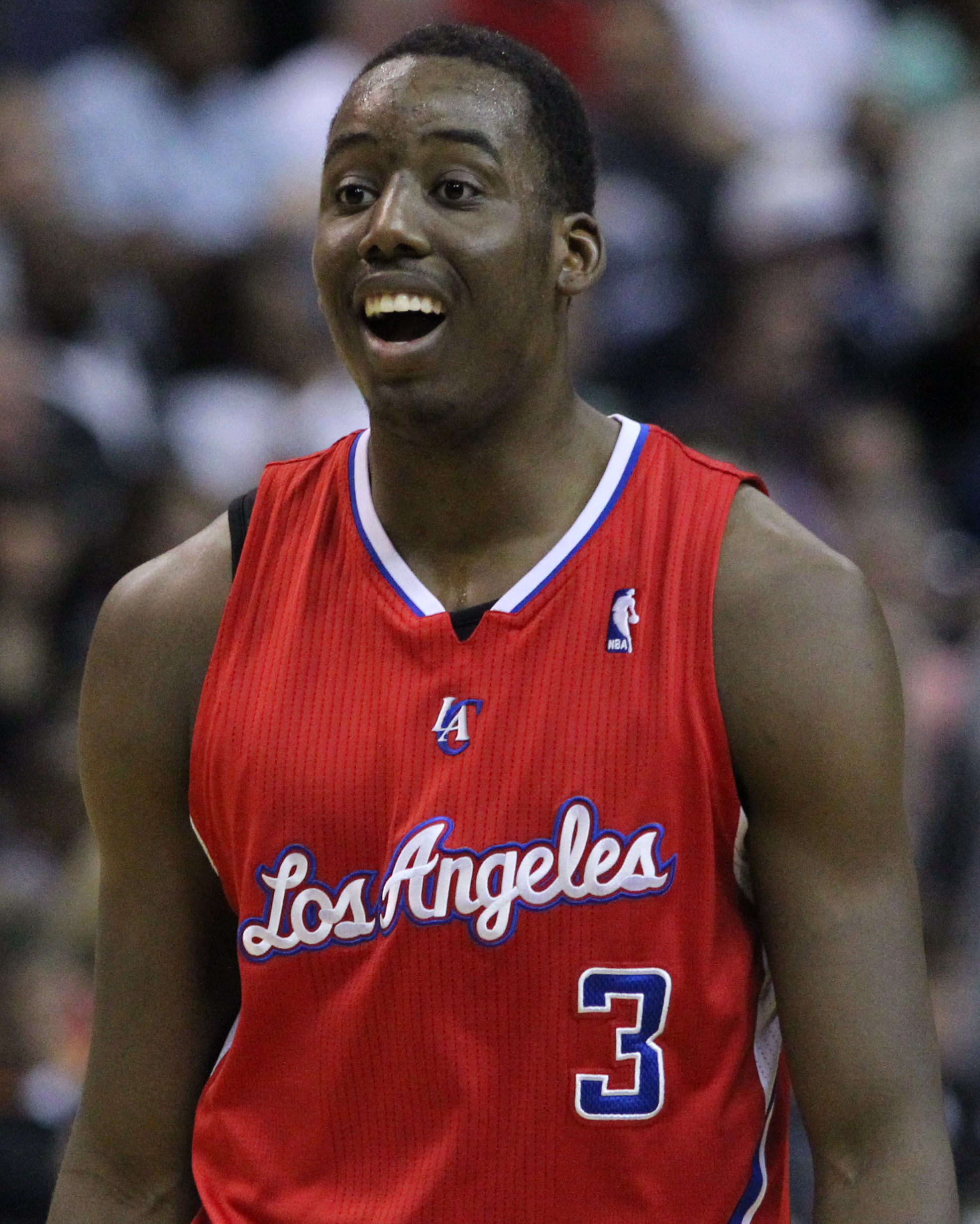 Wizards v/s Clippers 03/12/11